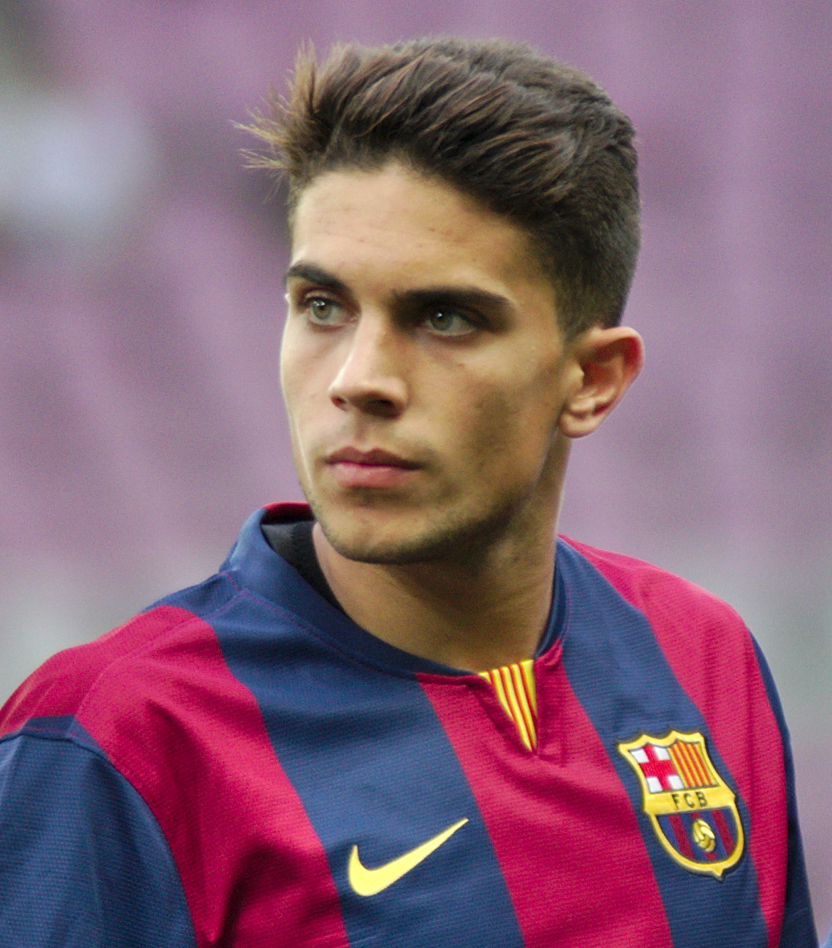 Barça - Napoli - 20140806 - Marc Bartra